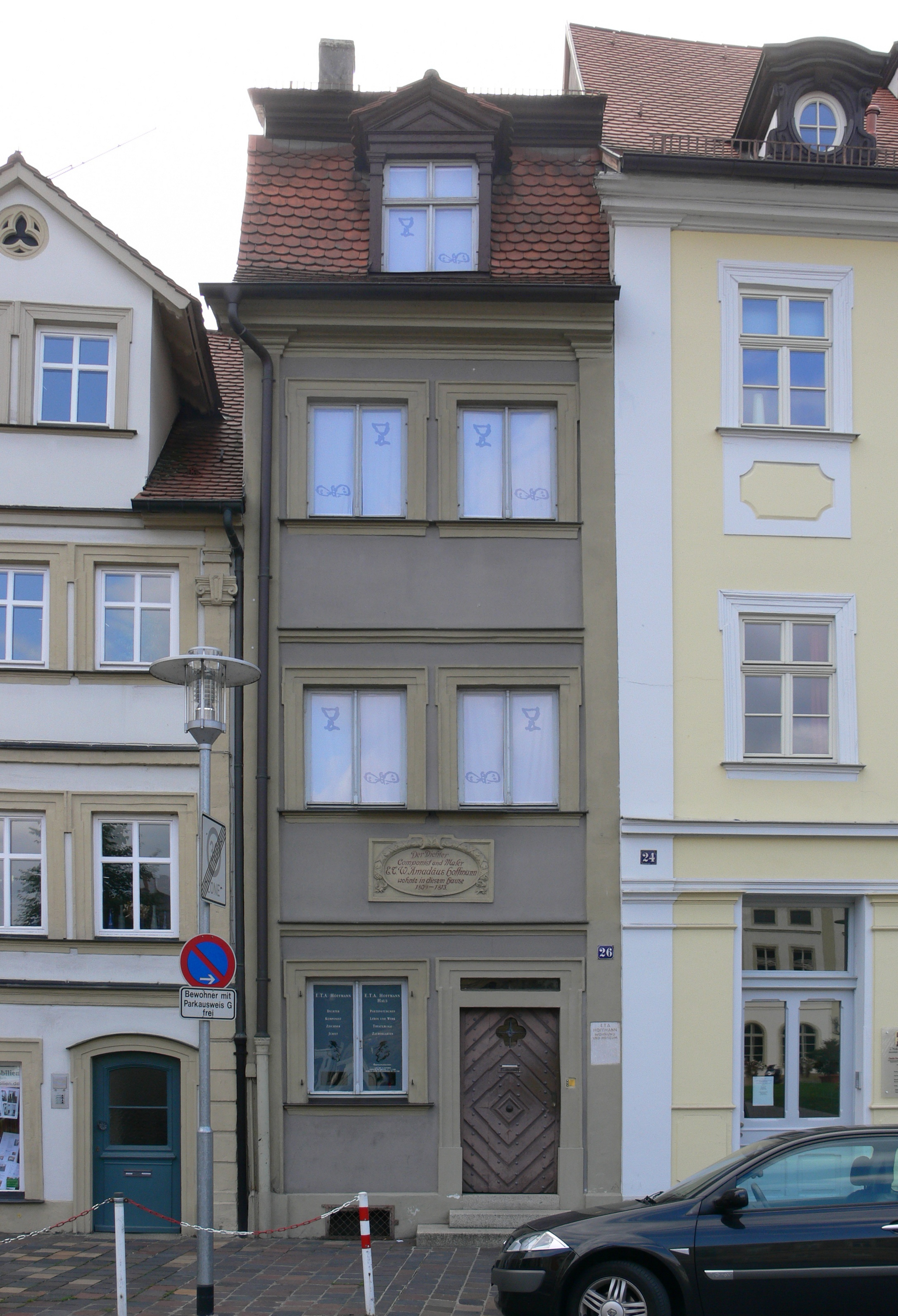 Bamberg, E.-T.-A.-Hoffmann-Haus, Schillerplatz 26